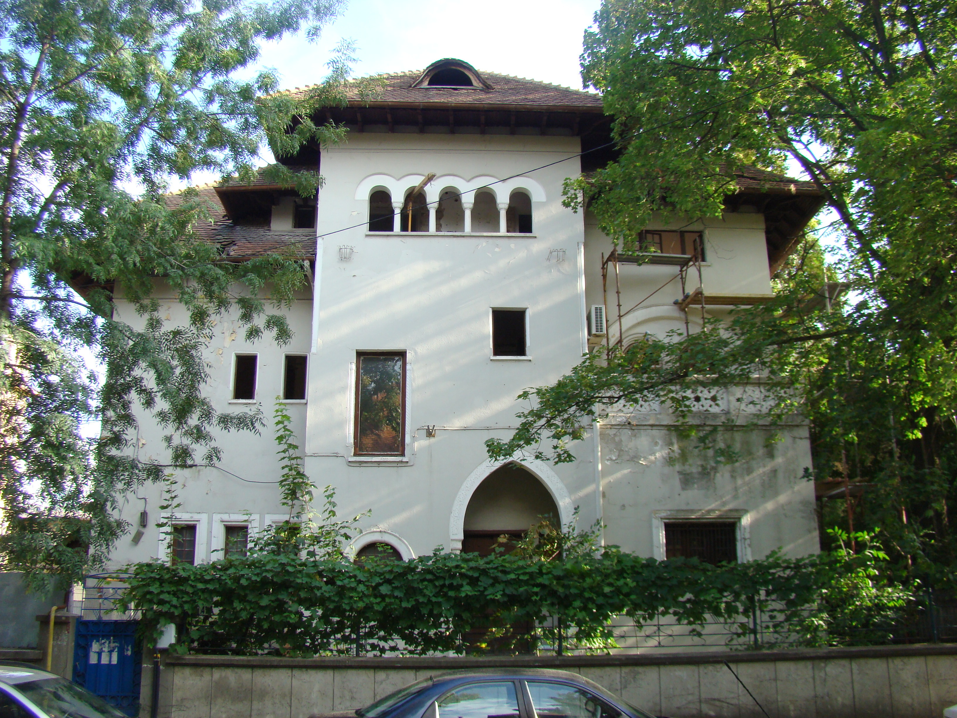 Casă monument istoric, str. Aleea Alexandru, nr. 47